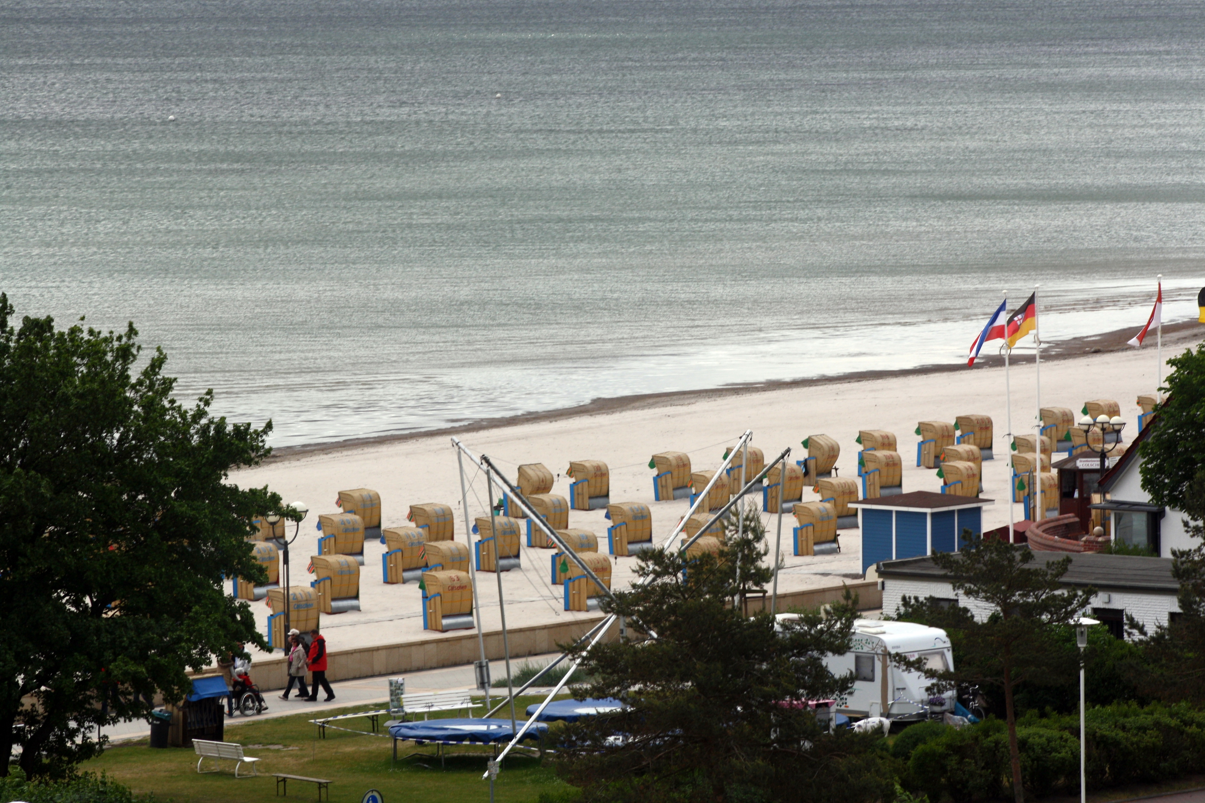 Grömitz, Ansicht mit Strandkörben